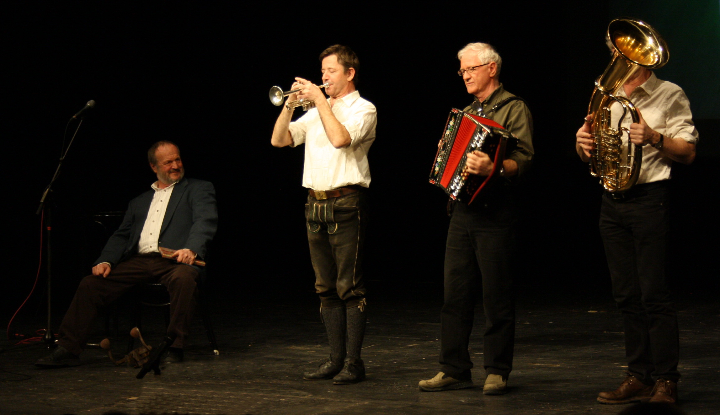 Fredl Fesl auf der Bühne des Volkstheaters München mit der Biermösl Blosn. Fredl Fesl erhält den Großen Valentins Preis 2010.